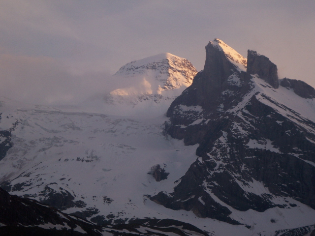 Tschingelhorn mit Lauterbrunnen-Wetterhorn